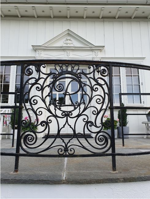 Trappegelender med monogram, trolig initialer for Otto Grundt Røsholm